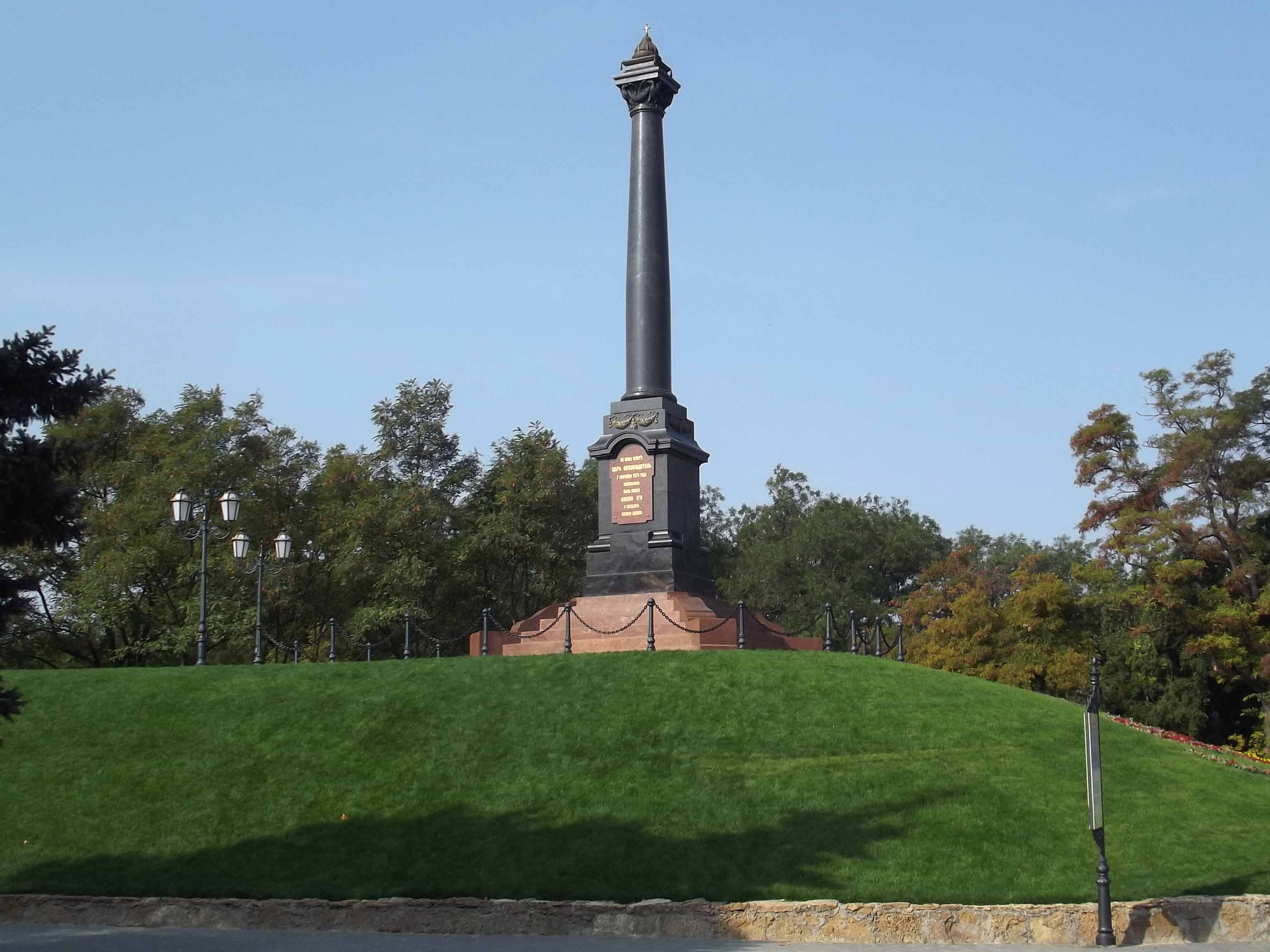 Александровская колонна